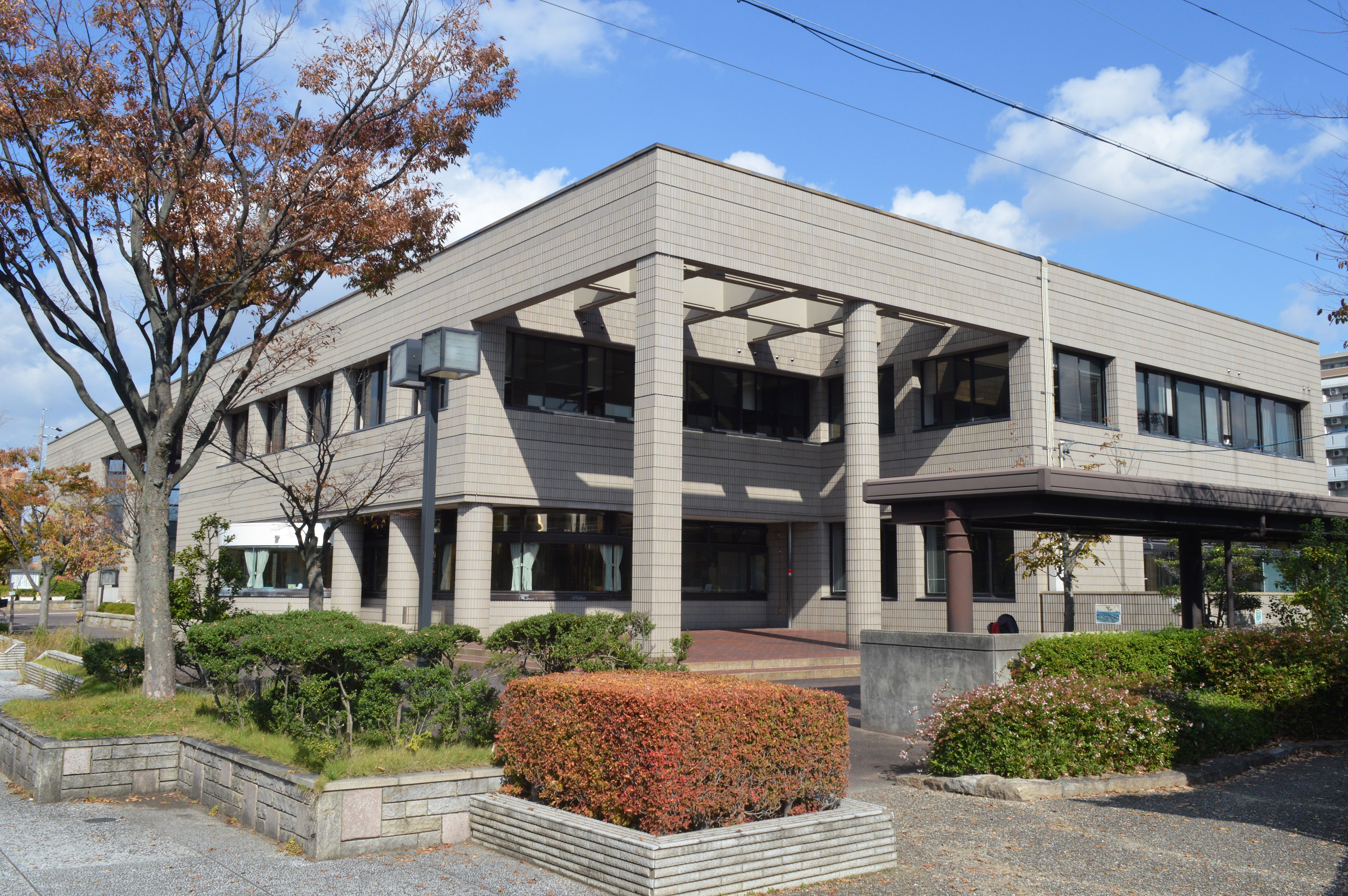 愛知県知立市の知立市図書館・知立市歴史民俗資料館。